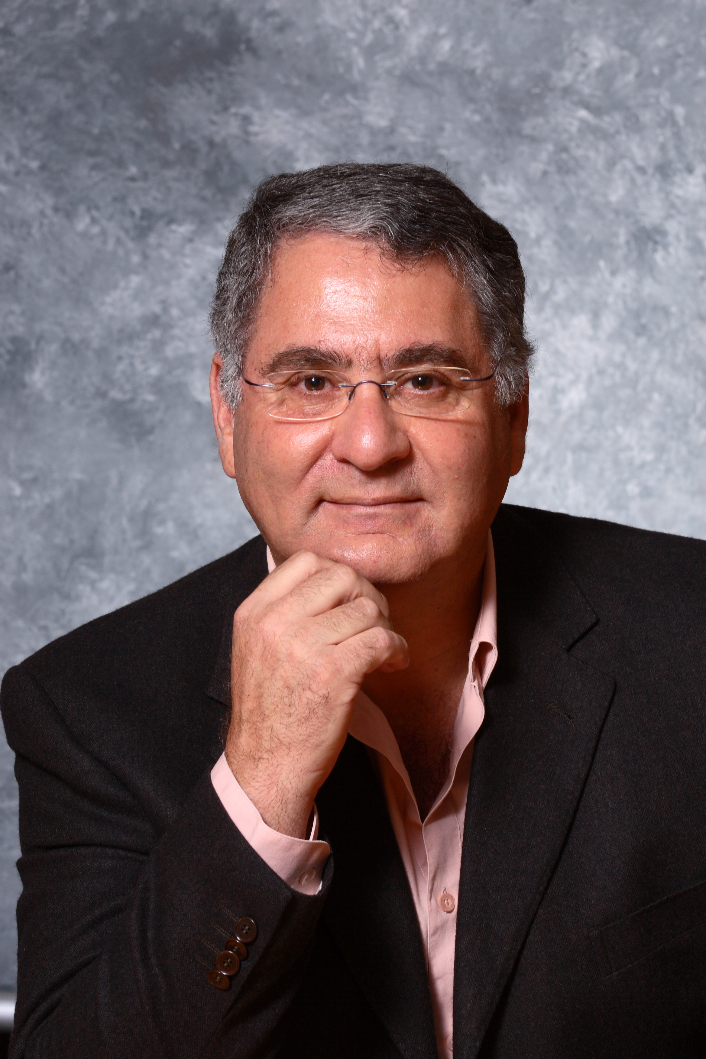 Eli Vakil